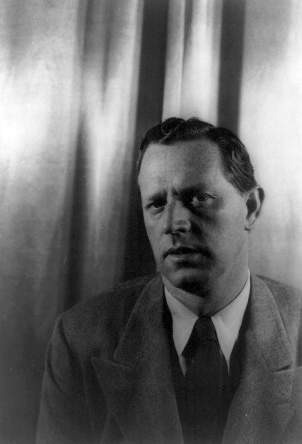 Erskine Caldwell, 1948